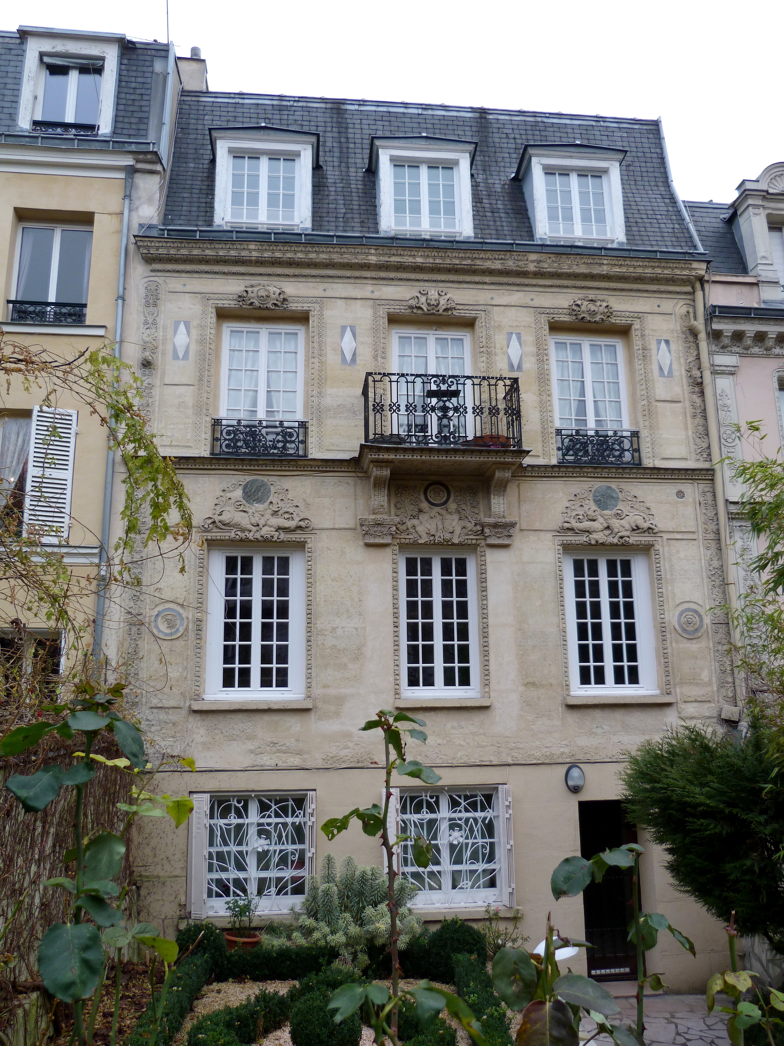 Cité des Fleurs, voie privée, Paris (17e arrond.), une maison bourgeoise typique vers 1850 au n°29